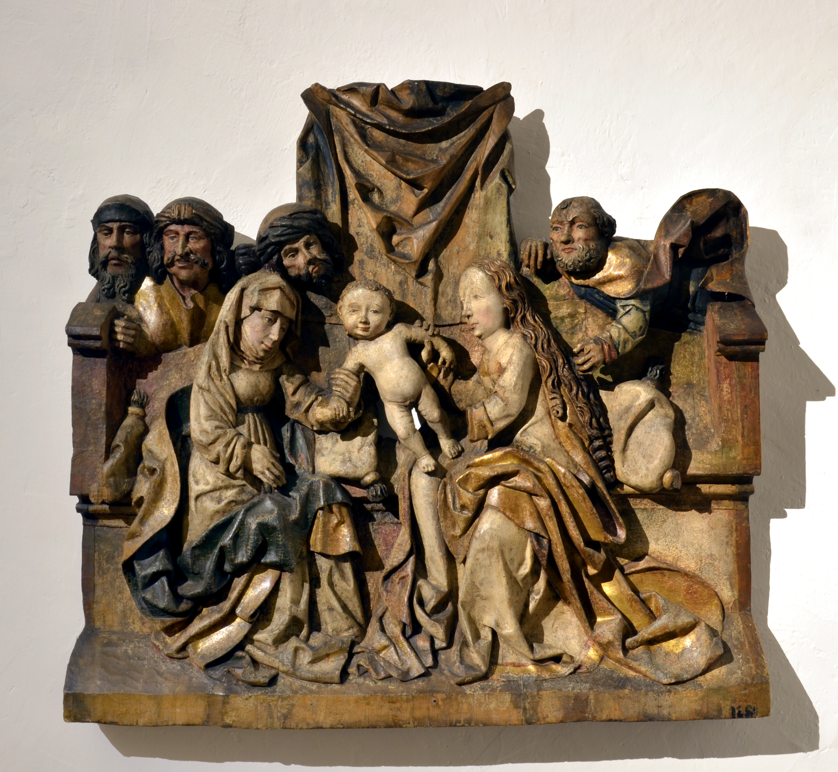 Kristovo příbuzenstvo z Prunéřova (1500-1510), lipový polychromovaný reliéf, 83 x 90 x 12 cm